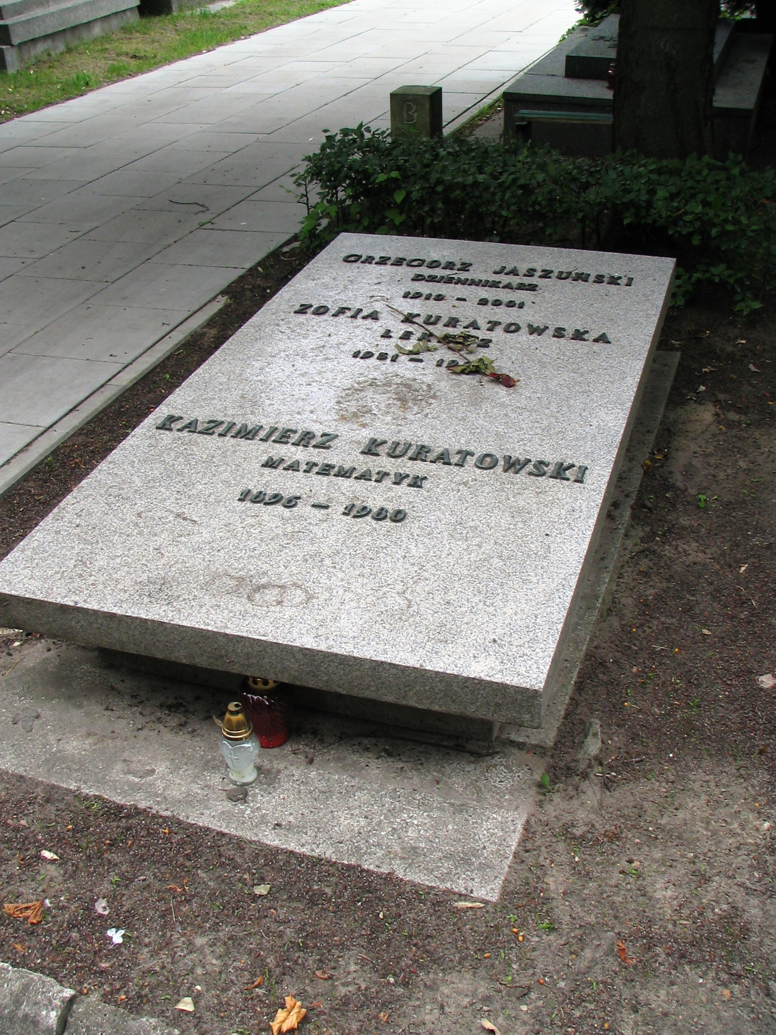 Grób Zofii Kuratowskiej i jej ojca Kazimierza